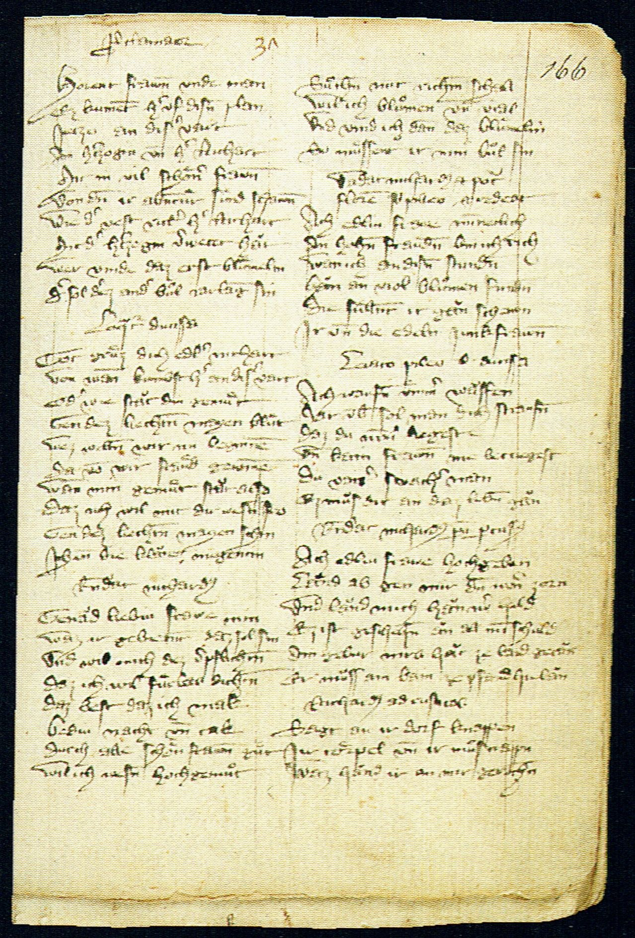 St. Pauler Neidhartspiel, Benediktinerstift St. Paul im Lavanttal (Kärnten), Codex 261/4, fol. 166r